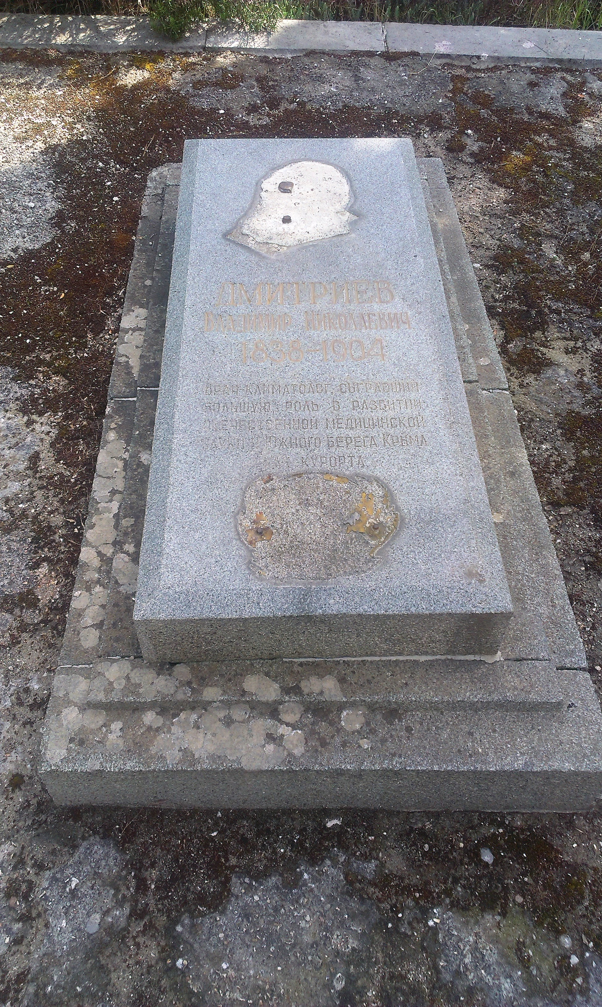 Поликуровский мемориал